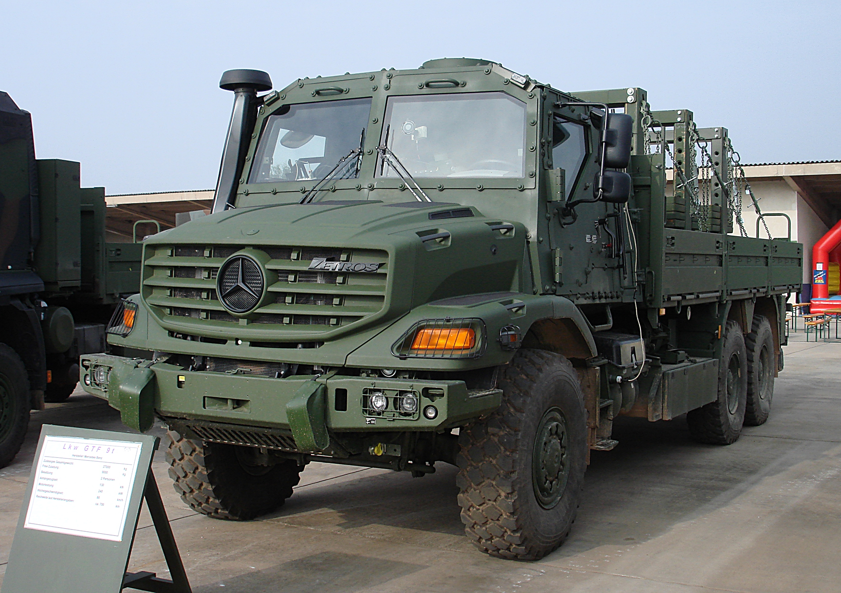 Erprobungsfahrzeug Geschützte Transportfahrzeuge (GTF), 9t-Klasse. Mercedes-Benz Zetros mit geschützter Fahrgastzelle an der Wehrtechnischen Dienststelle 41. Ausgestellt zum Tag der offenen Tür 2009.